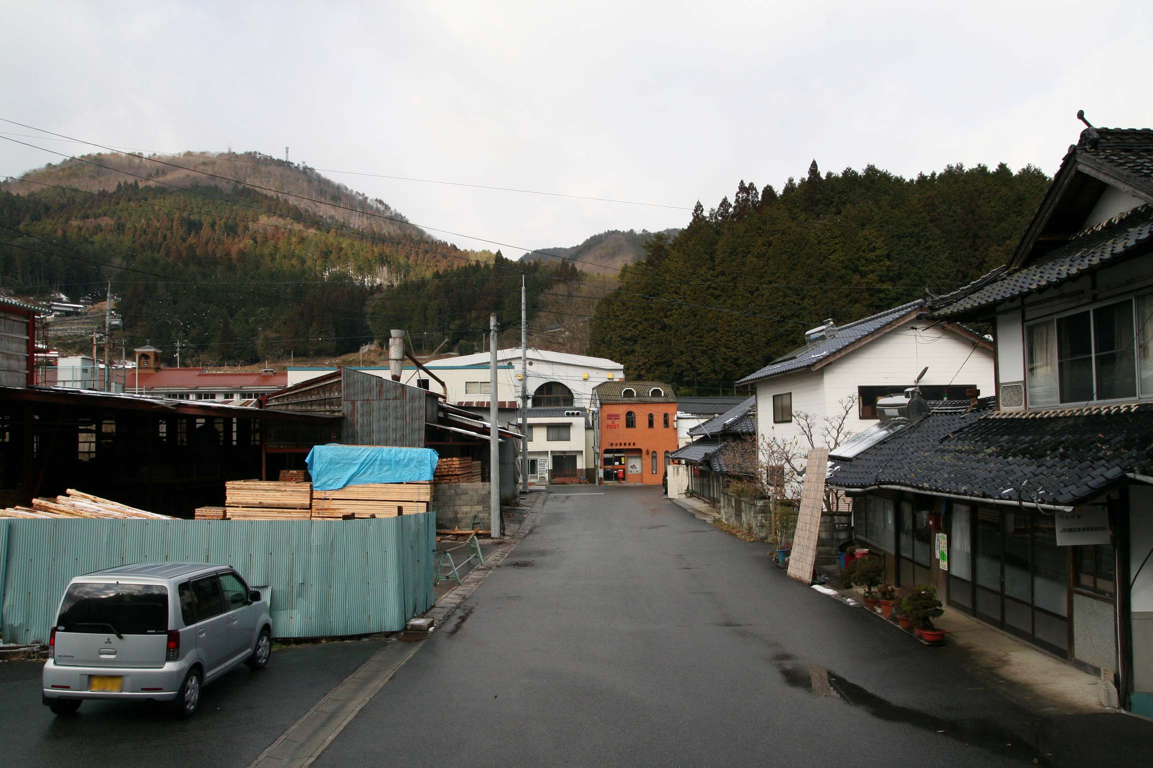 丹治部駅の周辺の様子